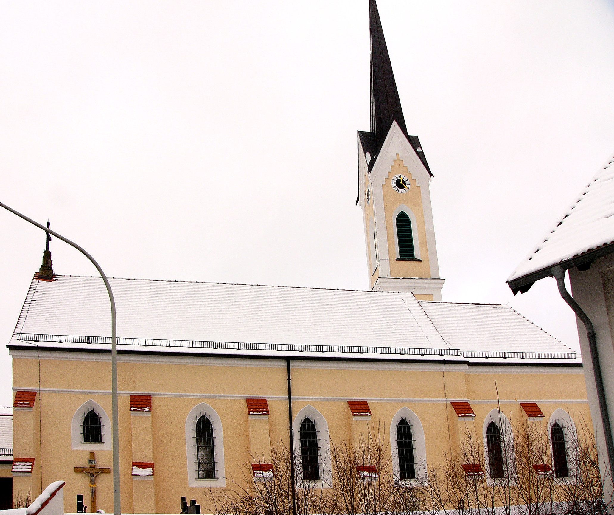 Katholische Pfarrkirche St. Margaretha, gotischer Saalbau mit eingezogenem Polygonalchor, angefügter zweigeschossiger Sakristei und Chorflankenturm, 15. Jahrhundert, 1756 barockisiert, Turm 1867/69 erneuert, Langhaus 1914 verlängert; mit Ausstattung. This is a photograph of an architectural monument.